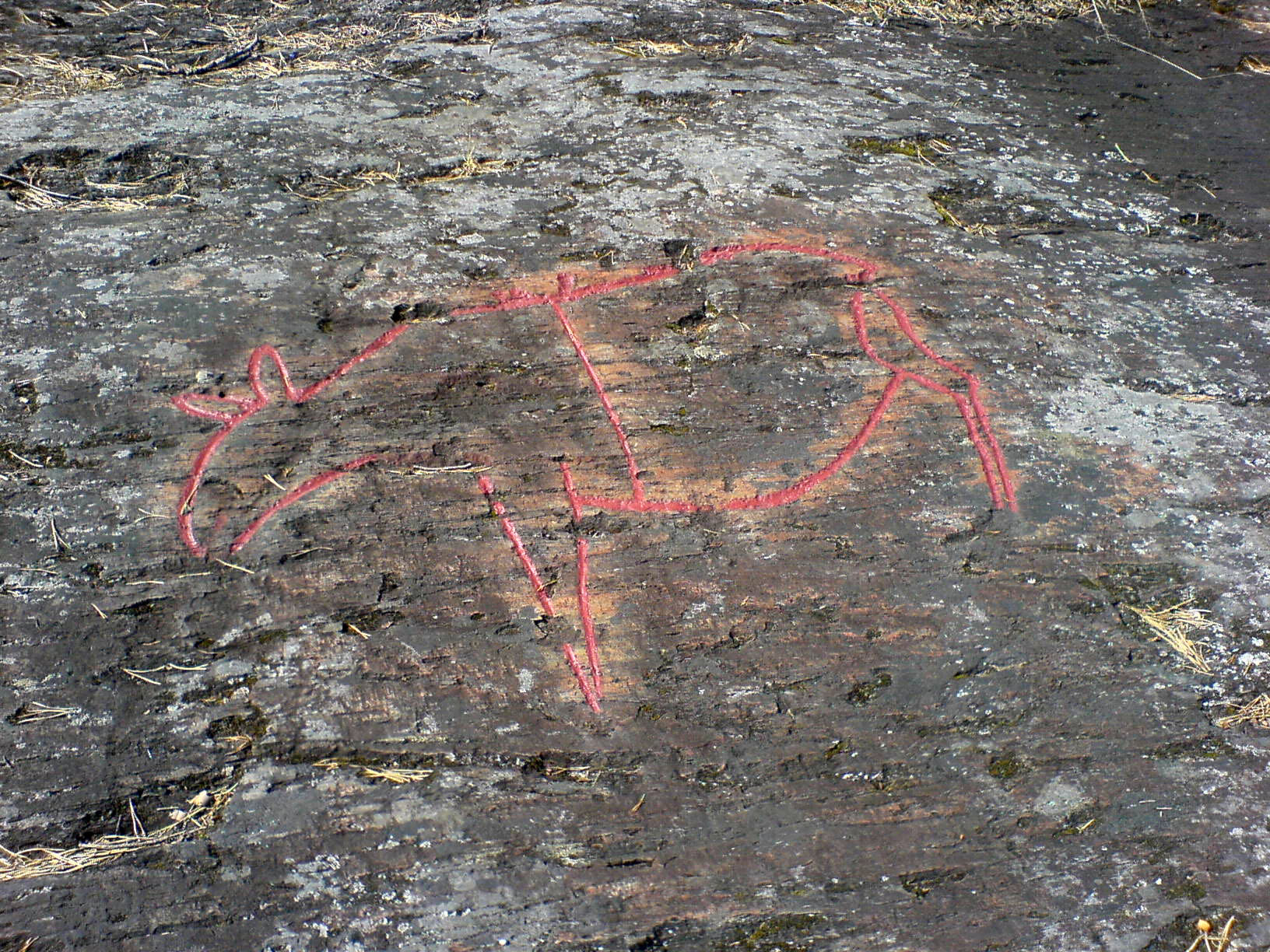 Hällristning vid Gärde i Jämtlands län.